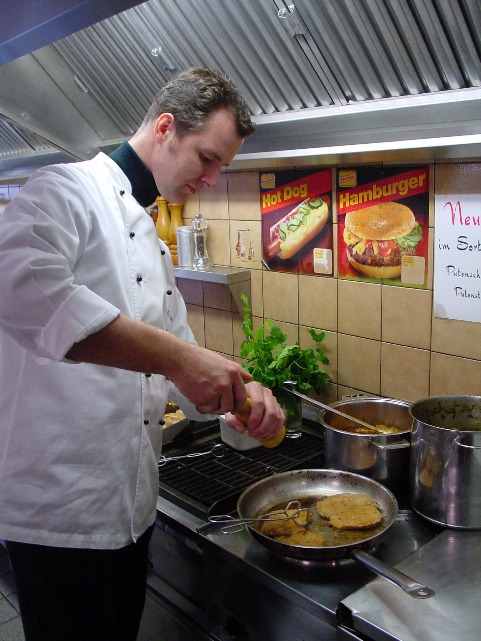 Profi Grill in Wattenscheid, Raimund Ostendorp würzt Schnitzel